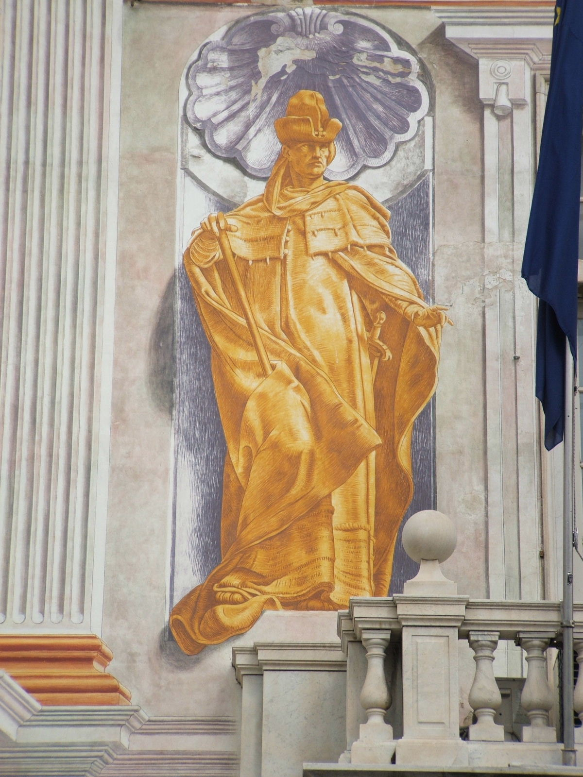 possibly immagine di Simone Boccanegra, primo doge perpetuo della Repubblica di Genova (XIV secolo); secondo taluni la figura dell'affresco potrebbe riferirsi invece a Guglielmo Boccanegra, avo di Simone, Capitano del Popolo e committente del Palazzo. Si tratta, nel prospetto principale, della quarta immagine da destra (la terza da sinistra).